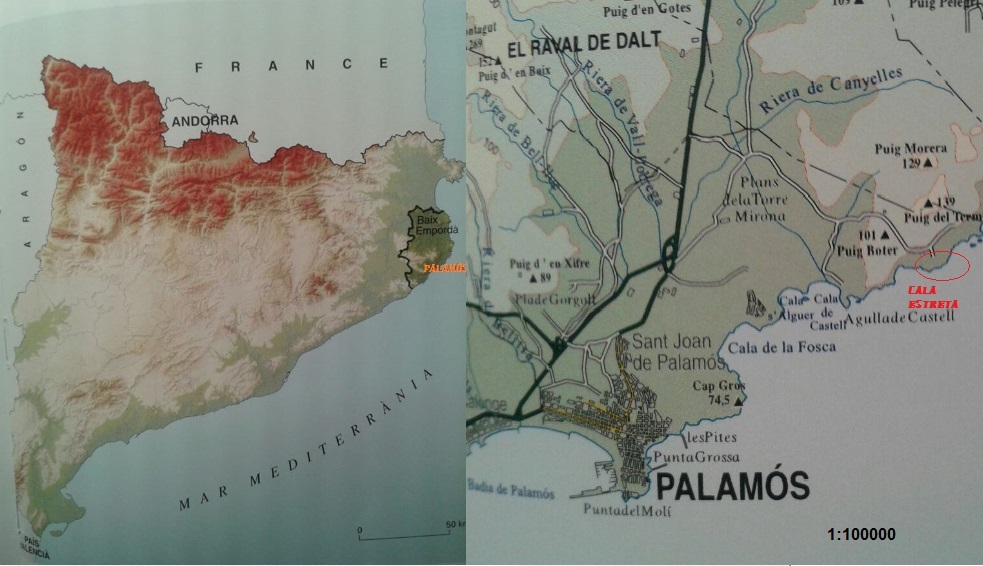 Geolocalització de Cala Estreta